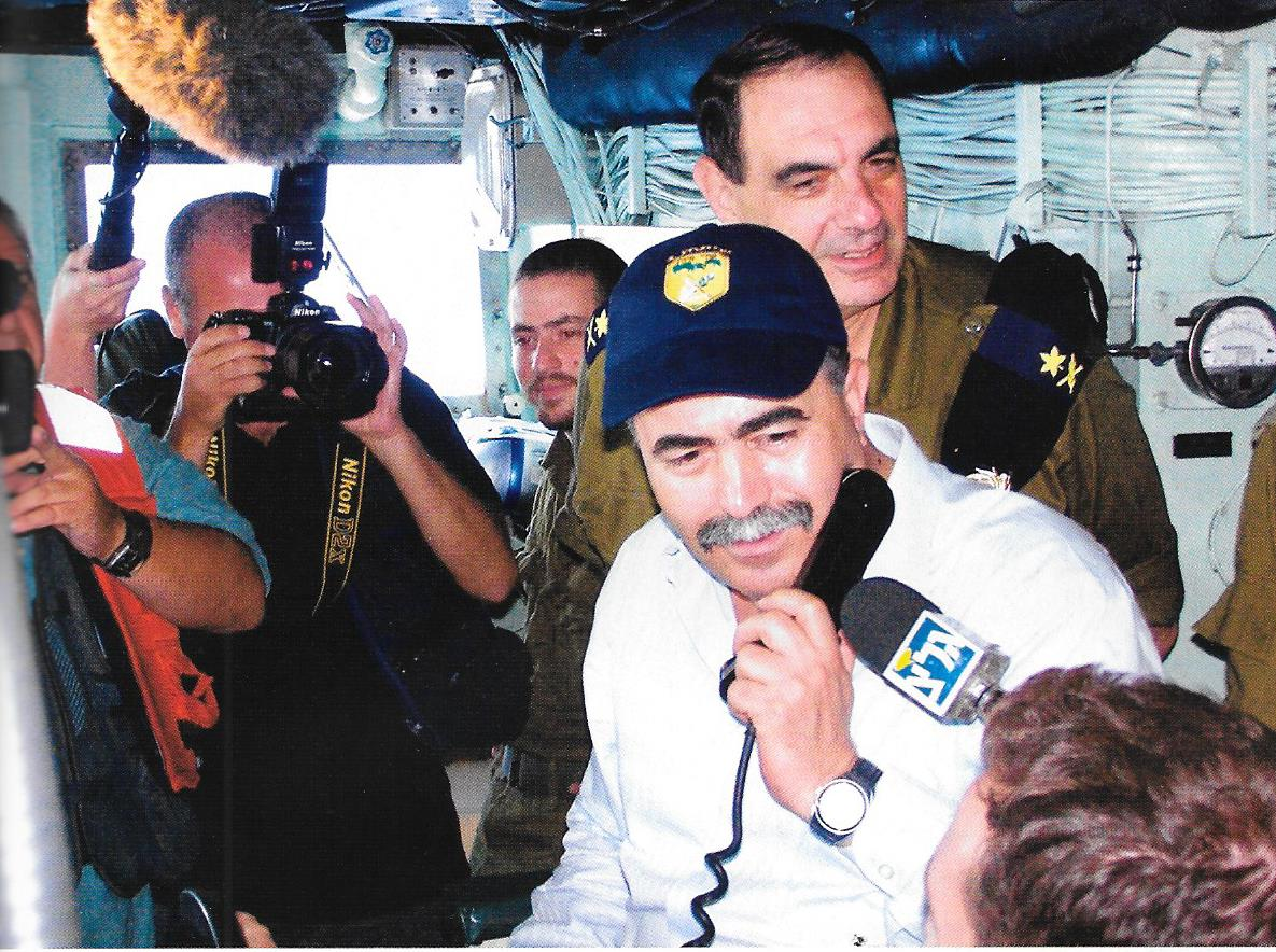 שר הביטחון עמיר פרץ מלווה על ידי מפקד חיל הים דוד בן בעש"ט בשיט באח"י אילת (סער 5) 28 ביולי 2006